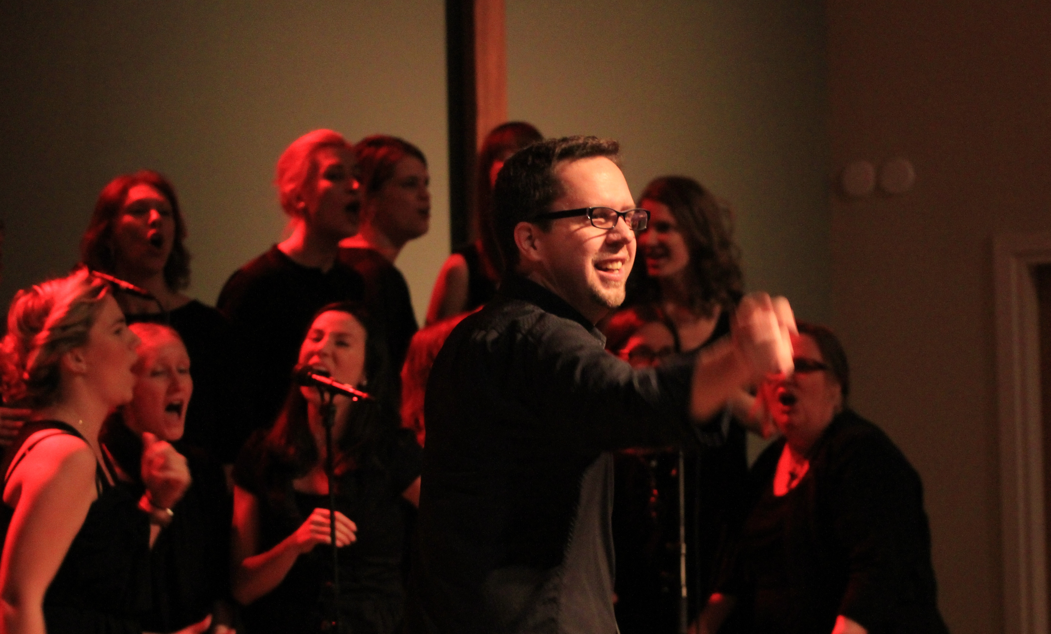 Jonas Engström